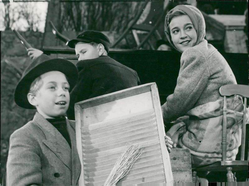 Foto på Kaj Hjelm, Sten "Knotan" Mattsson och Alice Babs i Vårat gäng infört i Svenska Dagbladet 1961-03-23 (sid 17) och 1961-03-23 (Weekend). Bildtext 1961: "Kajan Hjelm på visp och Alice Babs på piano utgör rytmsektionen i Vårat gängs orkester för 20 år sedan. I lördagens jubileumsprogram i radio håller man sig med sig med ett mindre primitivt slagverk." Bildtext 1985: "– Här på Söder, här på Söder, svingar vi med sväng... Året var 1941 när Vårat Gäng blev film och flyttlassorkestern dånade mot Söders höjder. Vid pianot Alice Babs och Sten "Knotan" Matsson, på trävisp och skrynkelbräda: Kajan Hjelm."